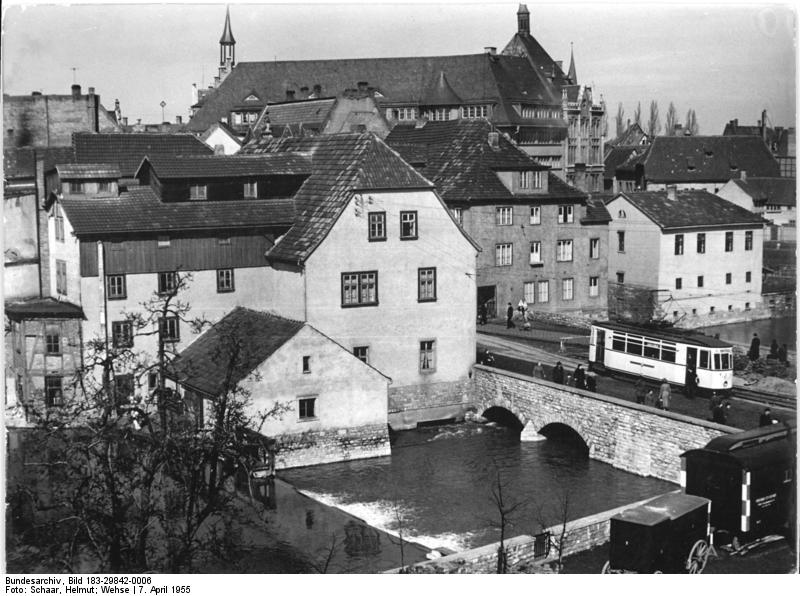 Erfurt, Hermann-Jahn-Straße, "Neue Mühle" Zentralbild Schaar Wehse-TBD 7.4.1955 -2897- 6 Mot. Erfurt baut auf. Ansicht der Neuen Mühle in der Hermann-Jahn-Strasse im März 1955. (siehe Foto 29842-5)